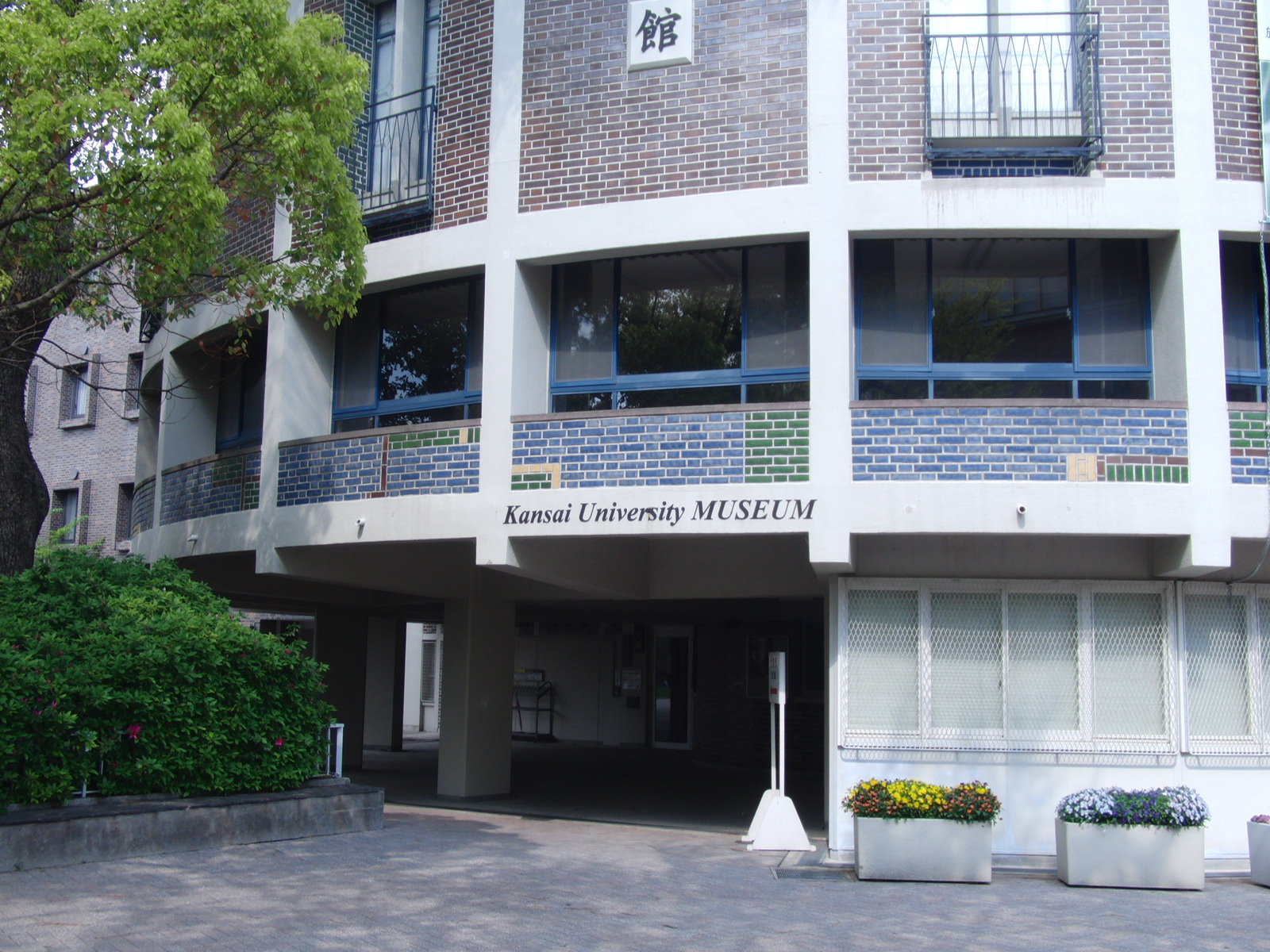 関西大学博物館を撮影。